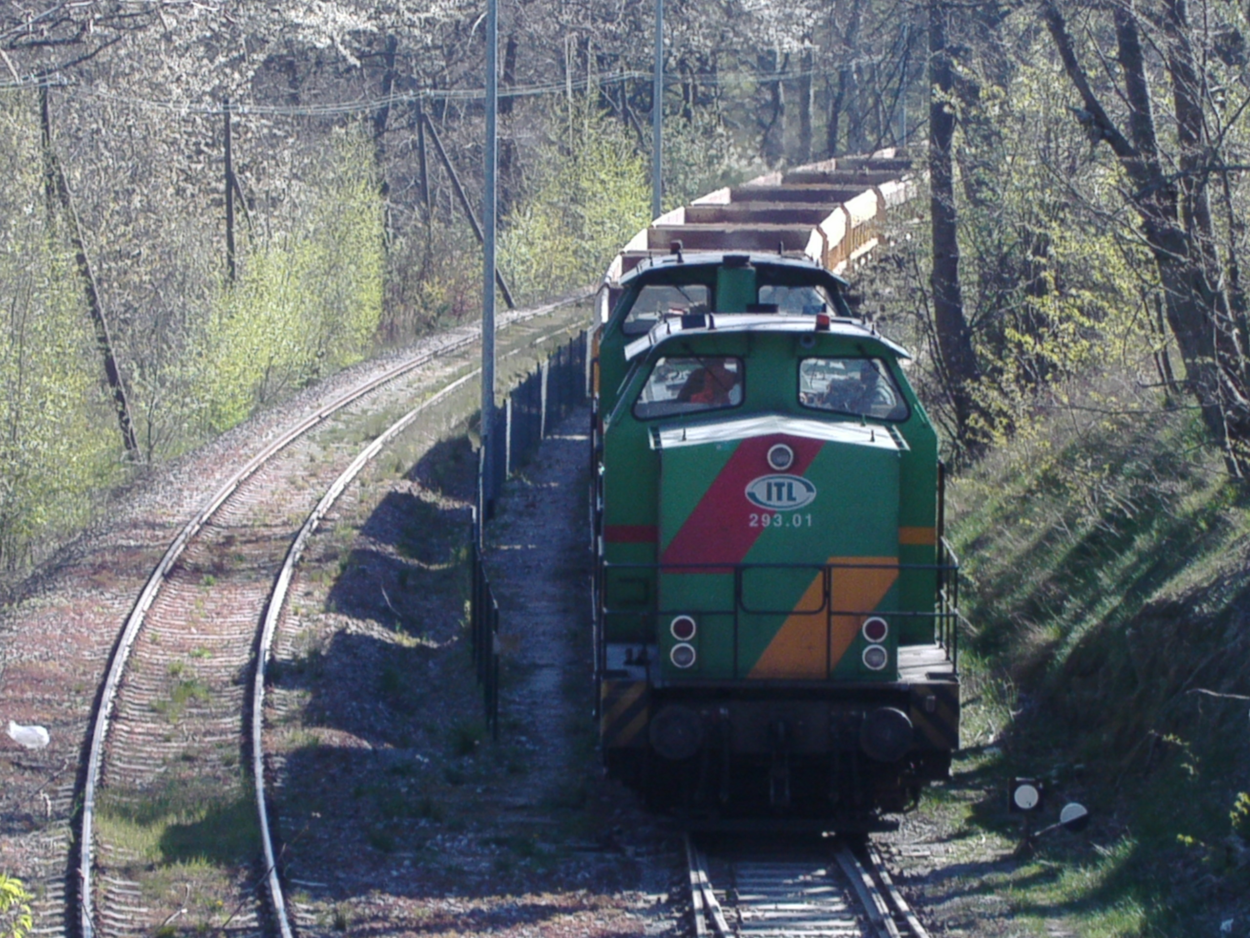 Ganzzug der ITL mit V100 und Seitenkippwagen im Anschlussgleis am Steinbruch Oberottendorf